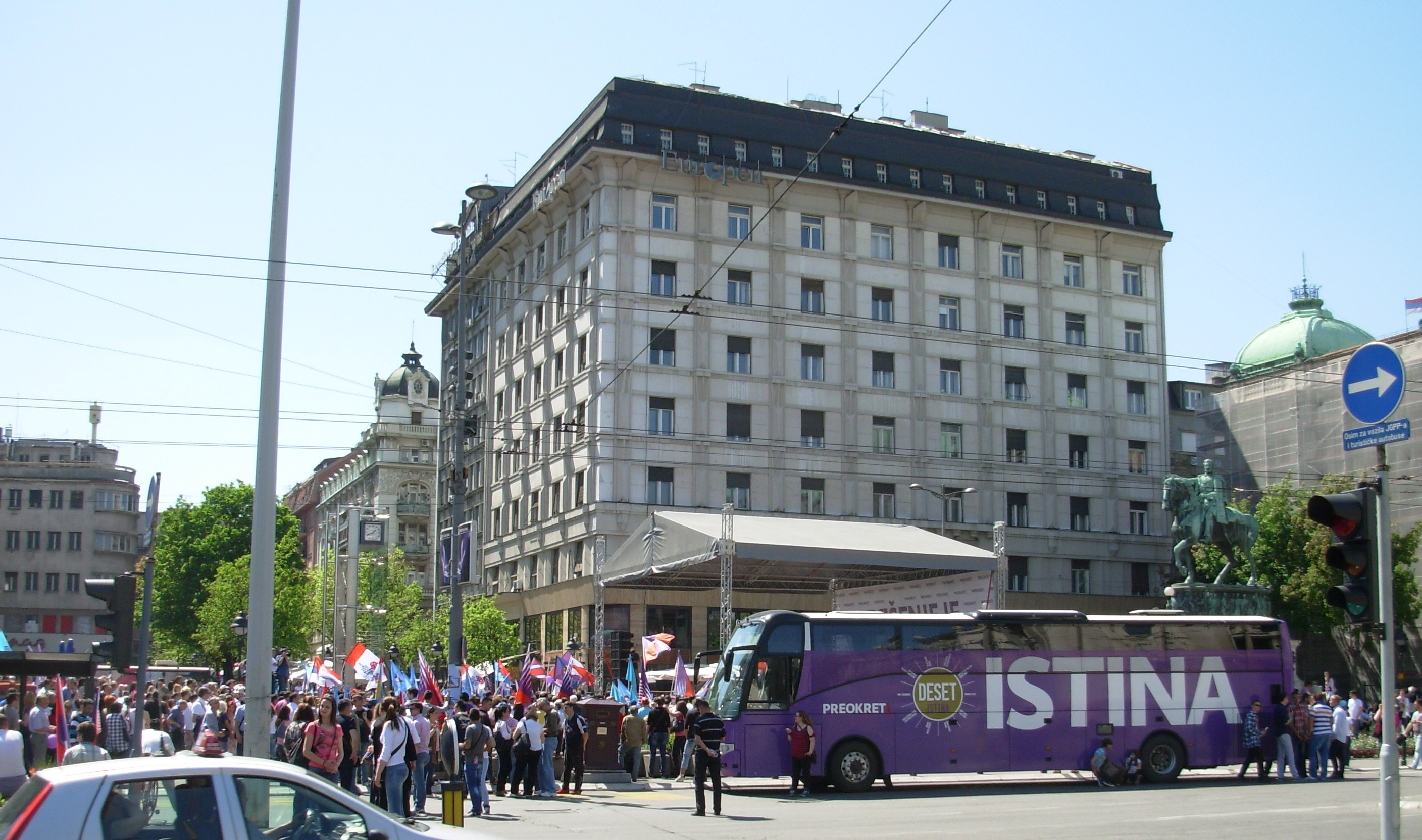 Predizborni moting Liberalno demokratske partije na Trgu Republike, Beograd, 2012. Slikao Golfinger